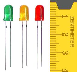 LED light emission diodes